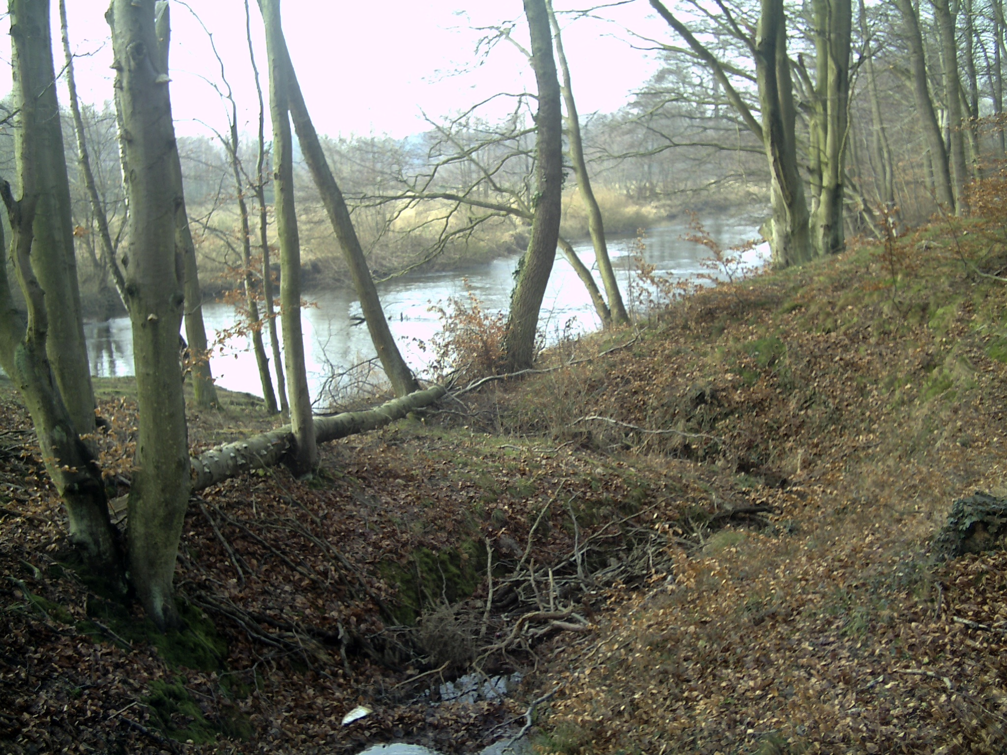 Słupia